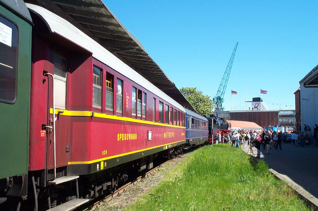 Sonderzug aus Hamburg im Amerika-Bahnhof Cuxhaven (Himmelfahrt 2001)